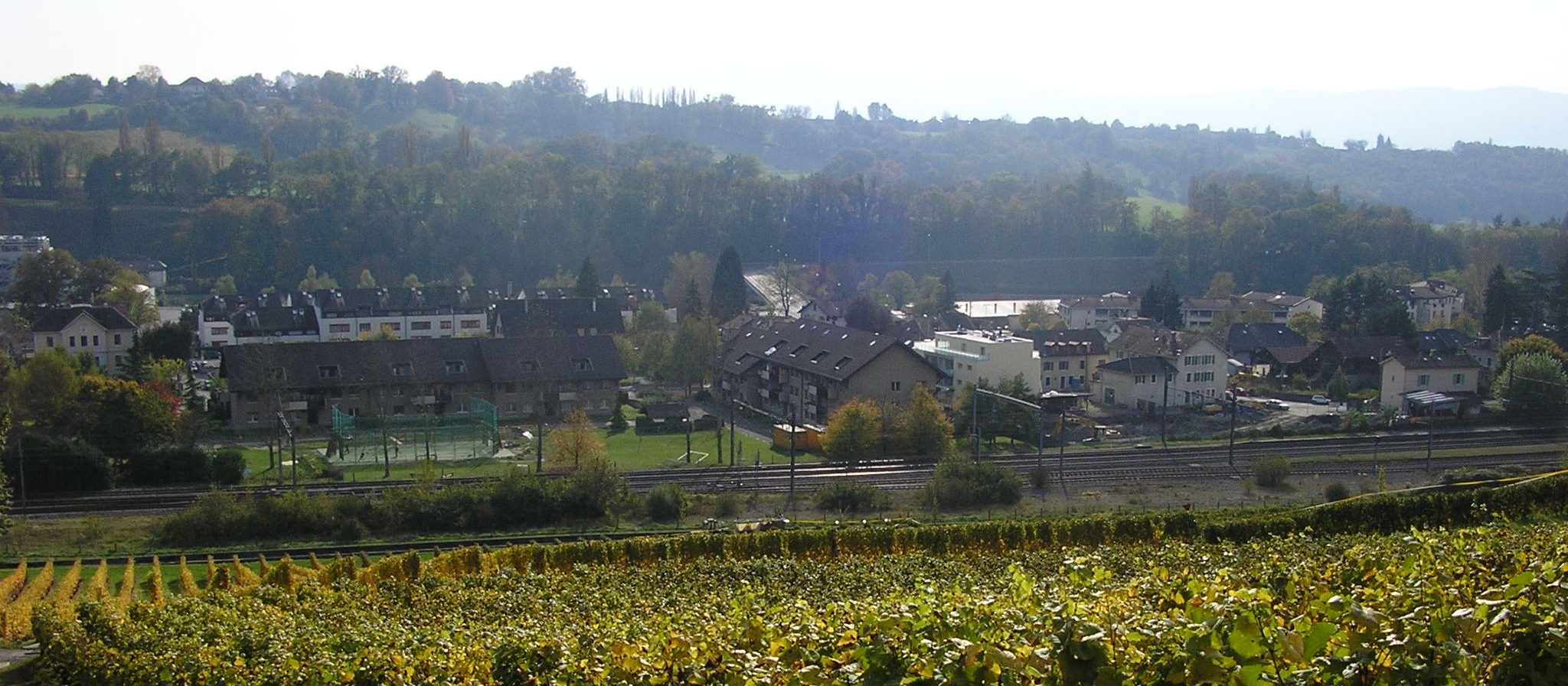 Le village de La Plaine à Genève